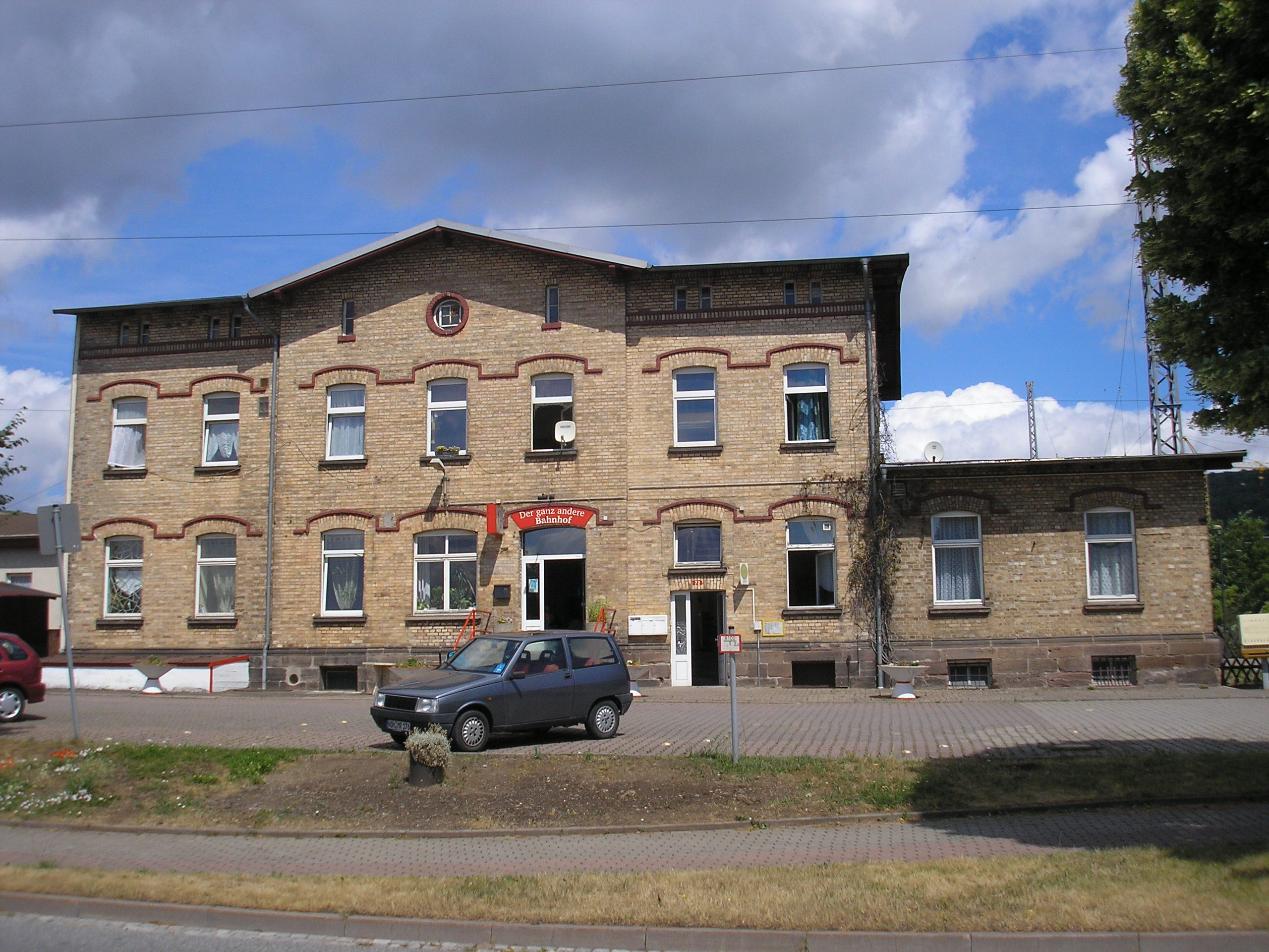 Der Bahnhof in Sollstedt (Thüringen).